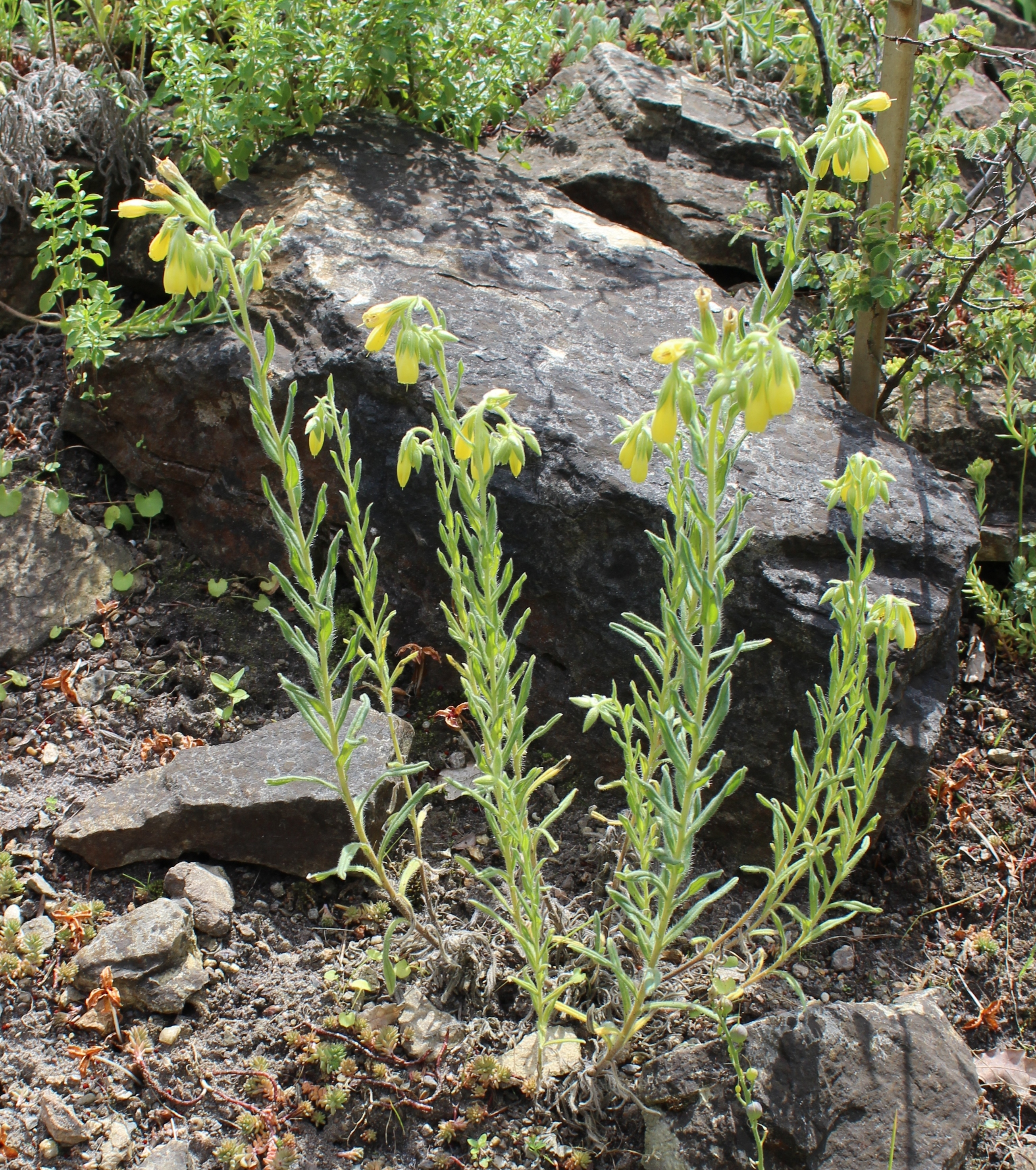 Onosma rigida Botanischer Garten Berlin-Dahlem